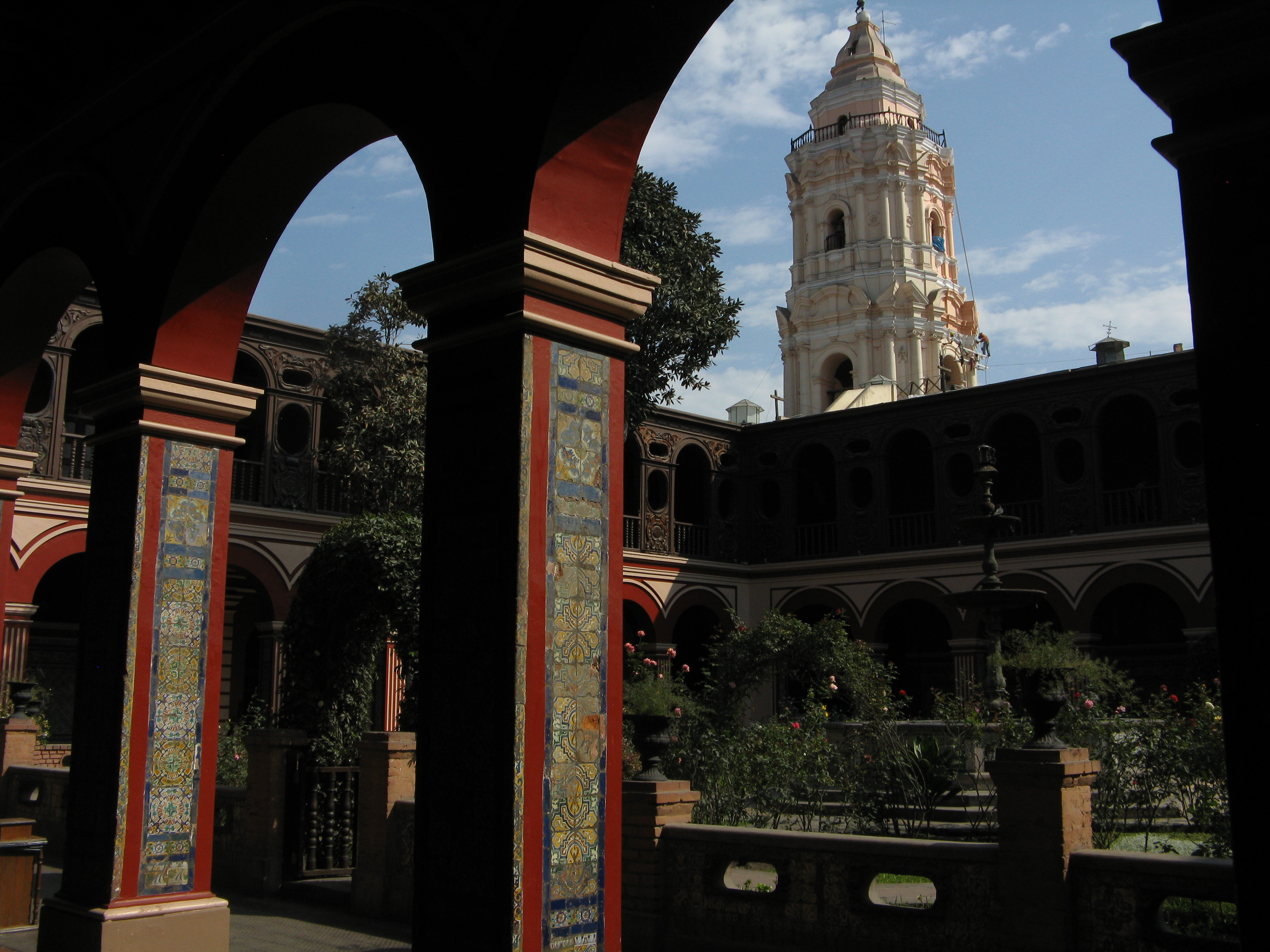 Blick vom vorderen Kreuzgang zum Kirchturm von St. Domingo in Lima